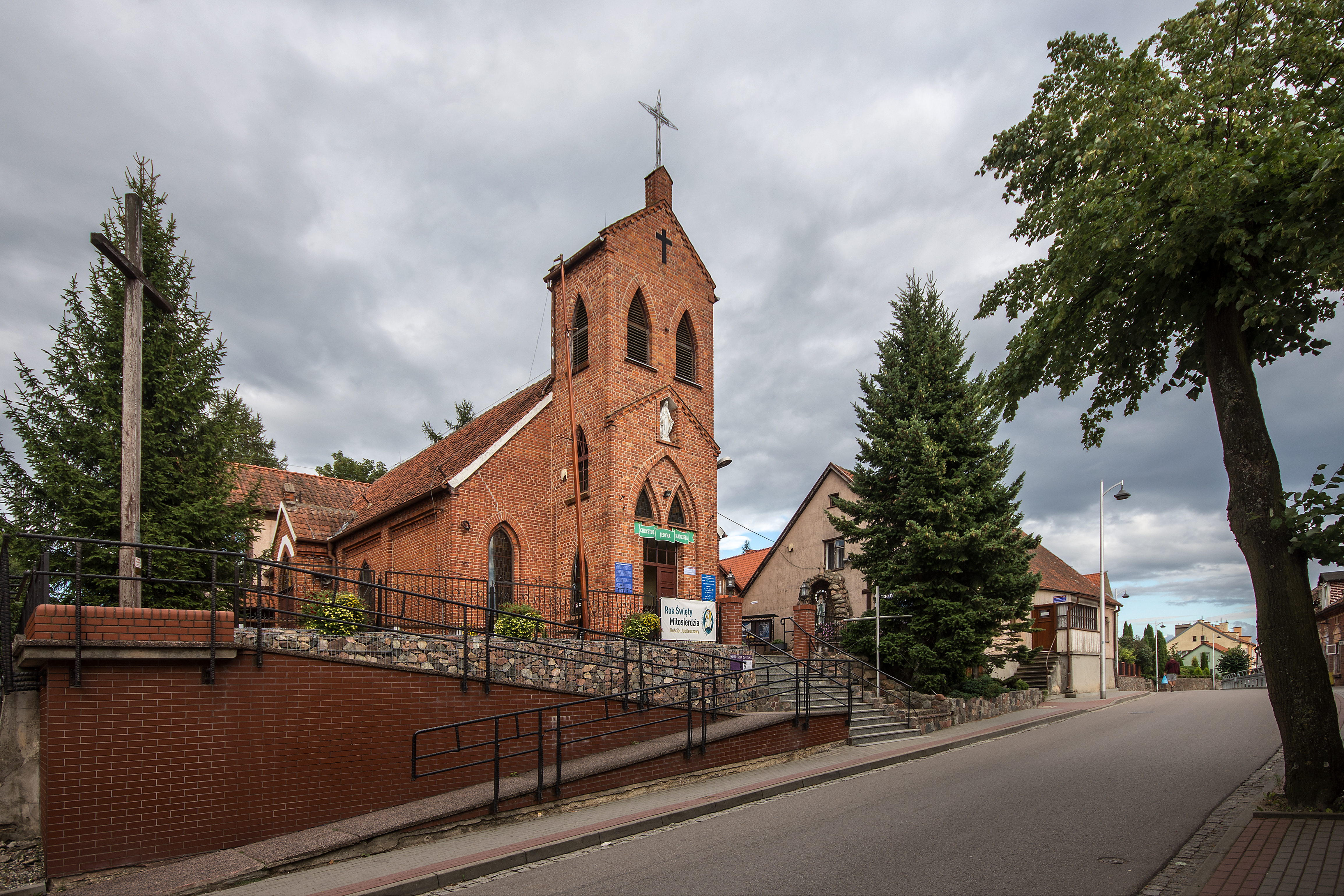 Mikołajki, kościół par. pw. Matki Boskiej Różańcowej z przylegającym budynkiem, 1910